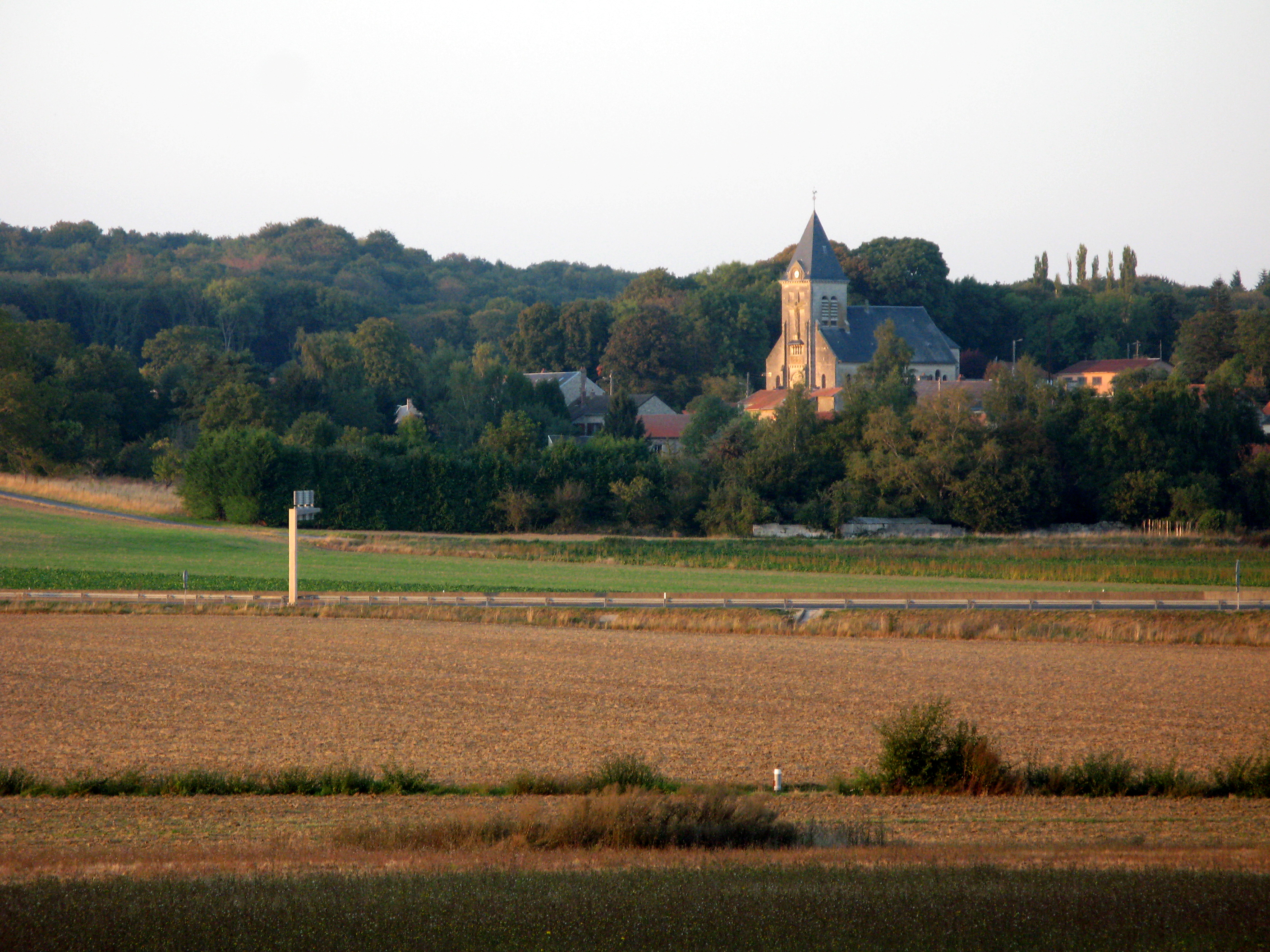 Hartennes-et-Taux (Aisne, France) - Panorama sur le village. . .